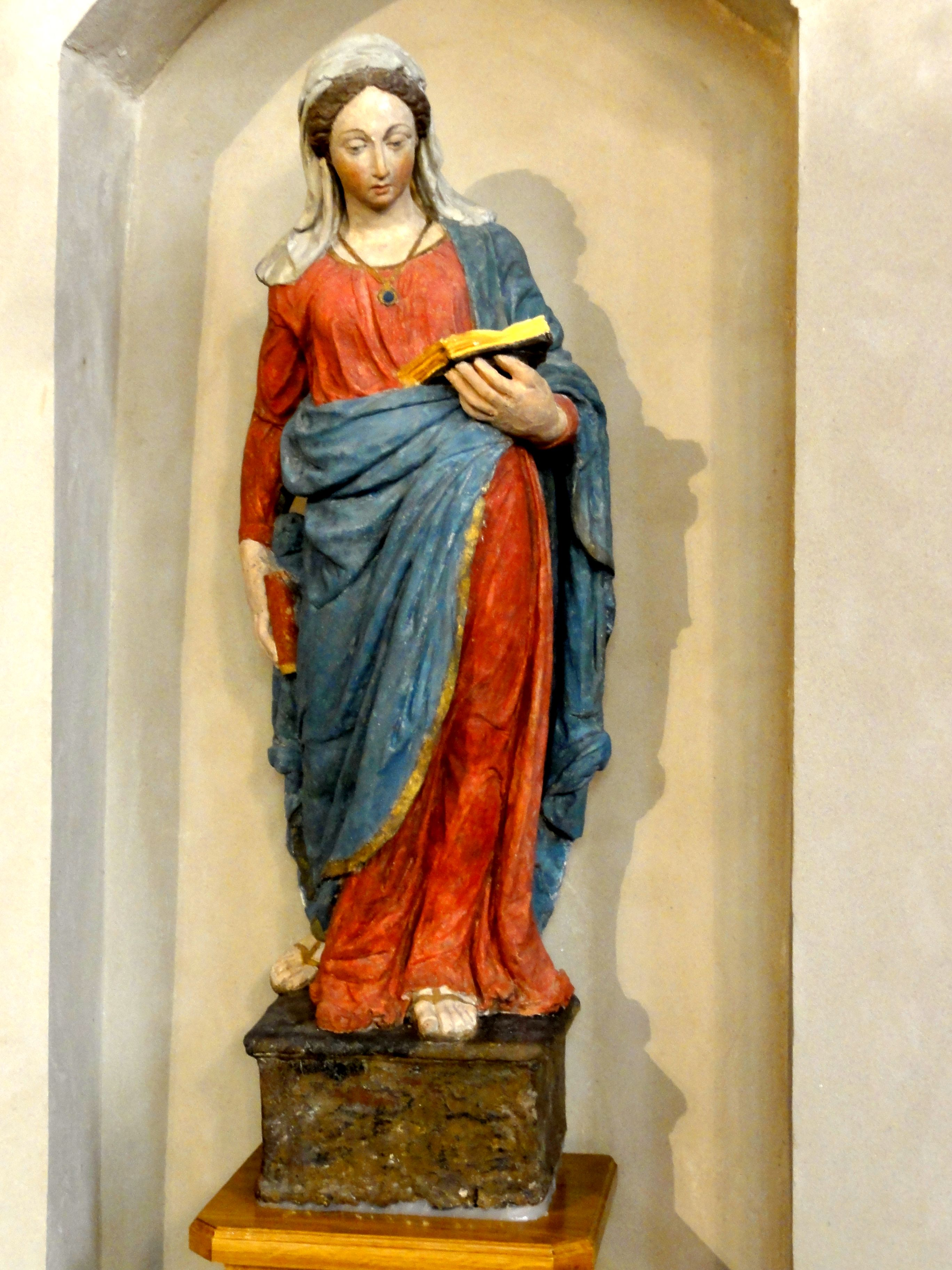 Chœur, sainte martyre ou Vierge de l'Annonciation (l'identification de la statue reste incertaine).